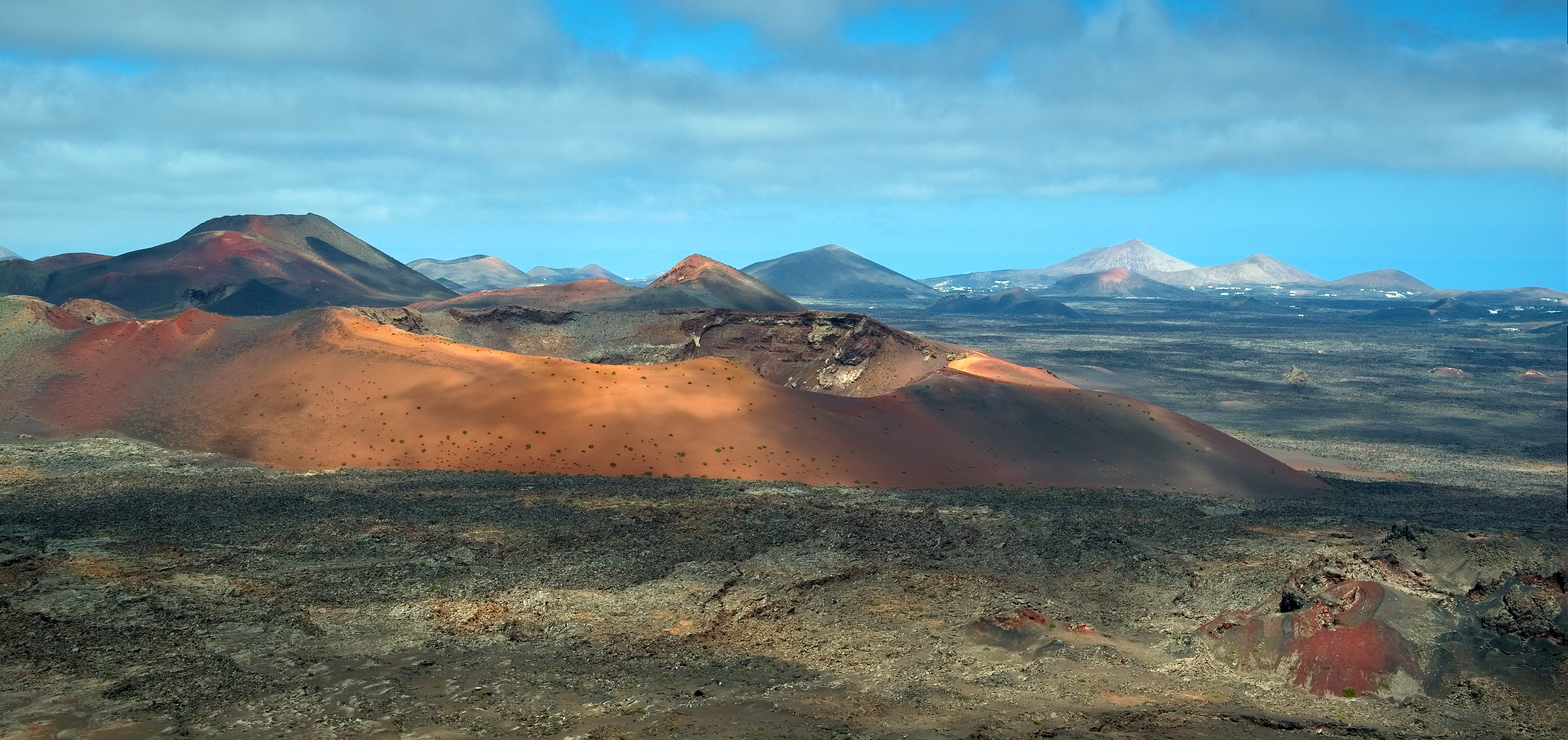 Parc naturel des volcans de Timanfaya Lanzarote îles Cannaries (Espagne)